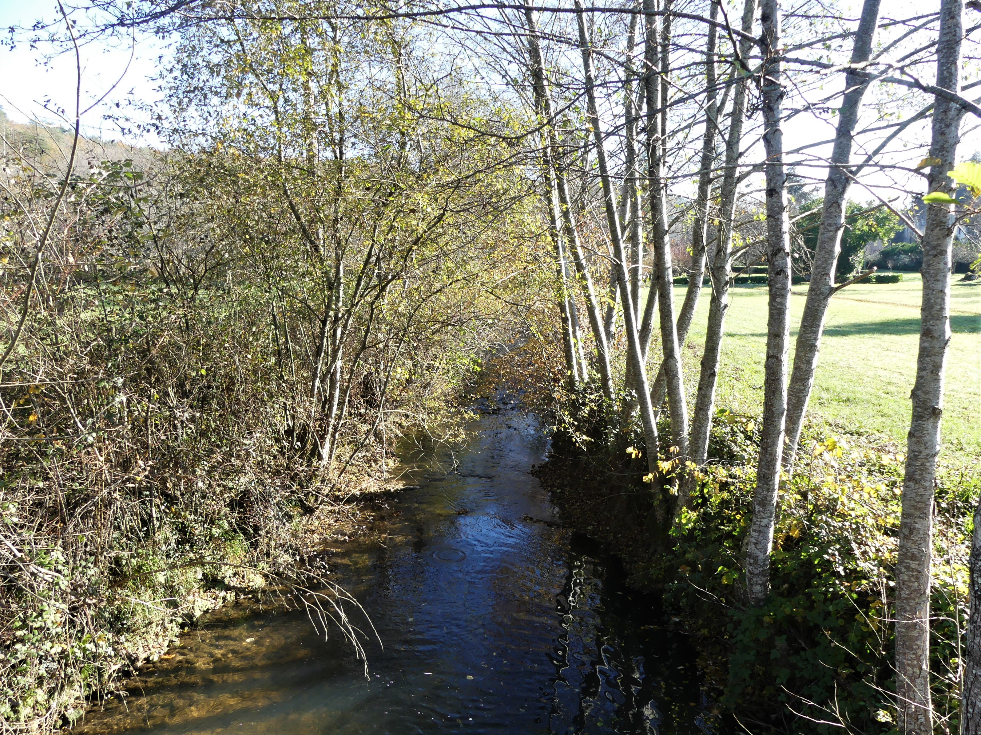 Le ruisseau de Manaurie au pont de la route départementale 31, Manaurie, Dordogne, France. Vue prise en direction de l'aval.